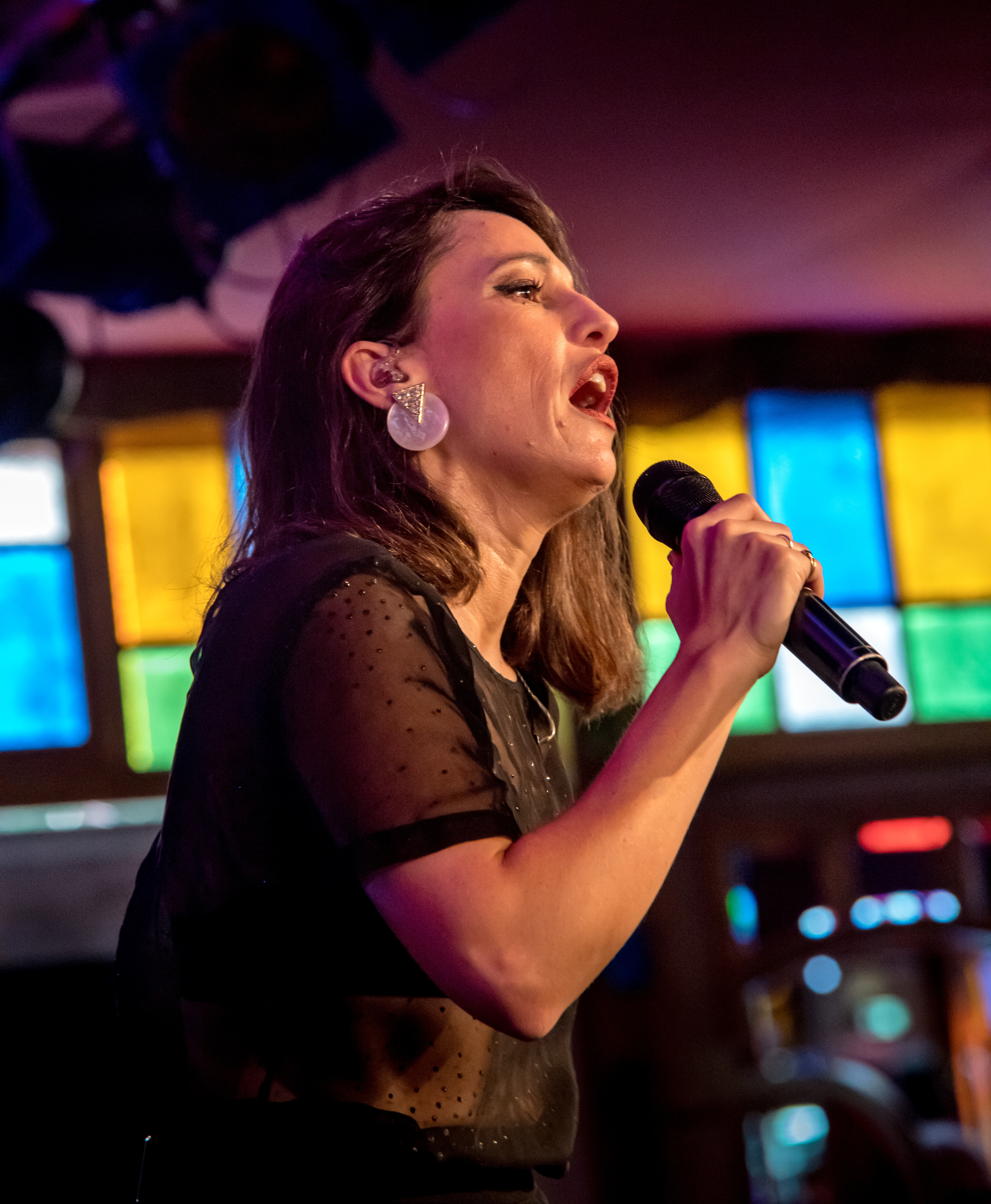 Bilder vom Zelt Musik Festival 2018 in Freiburg im Breisgau Auftritt Carminho am 24. Juli 2018 im Spiegelzelt